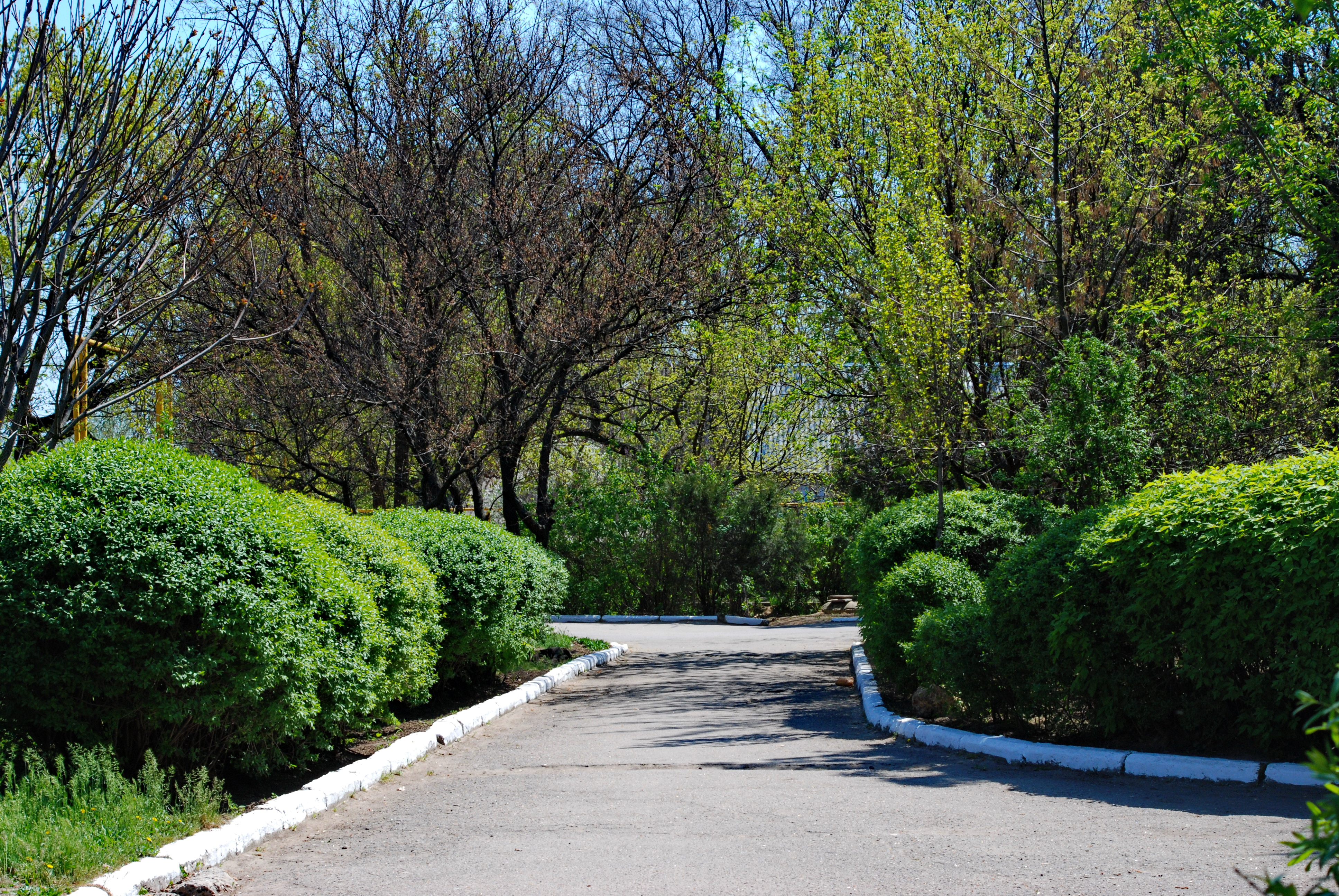 м. Херсон, вул. Полтавська, 89.